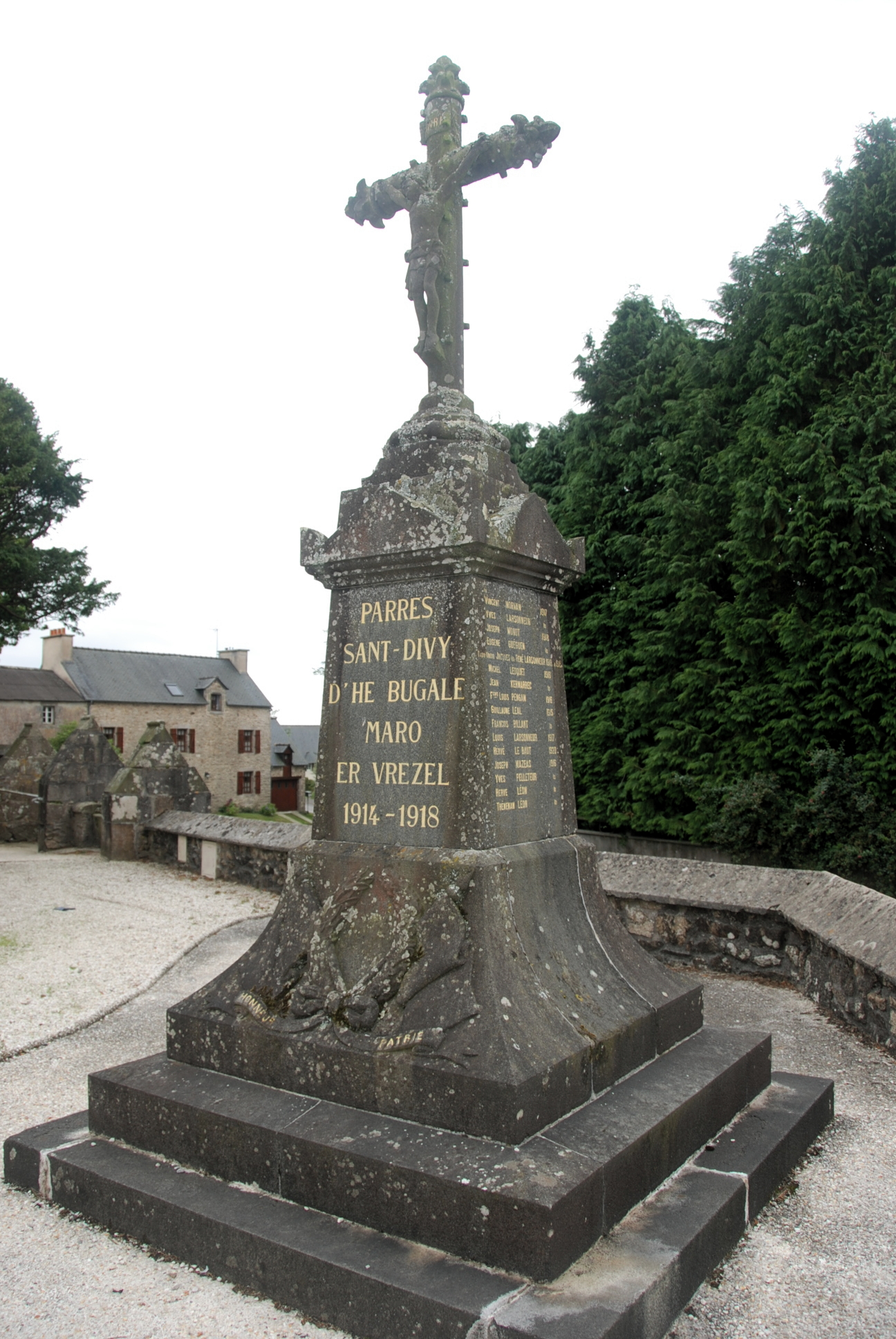 Monument aux Morts - St Divy-29